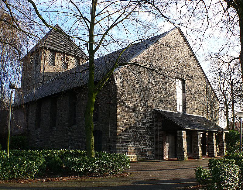 Haltern Lippramsdorf St Lambertus, eigenes Foto